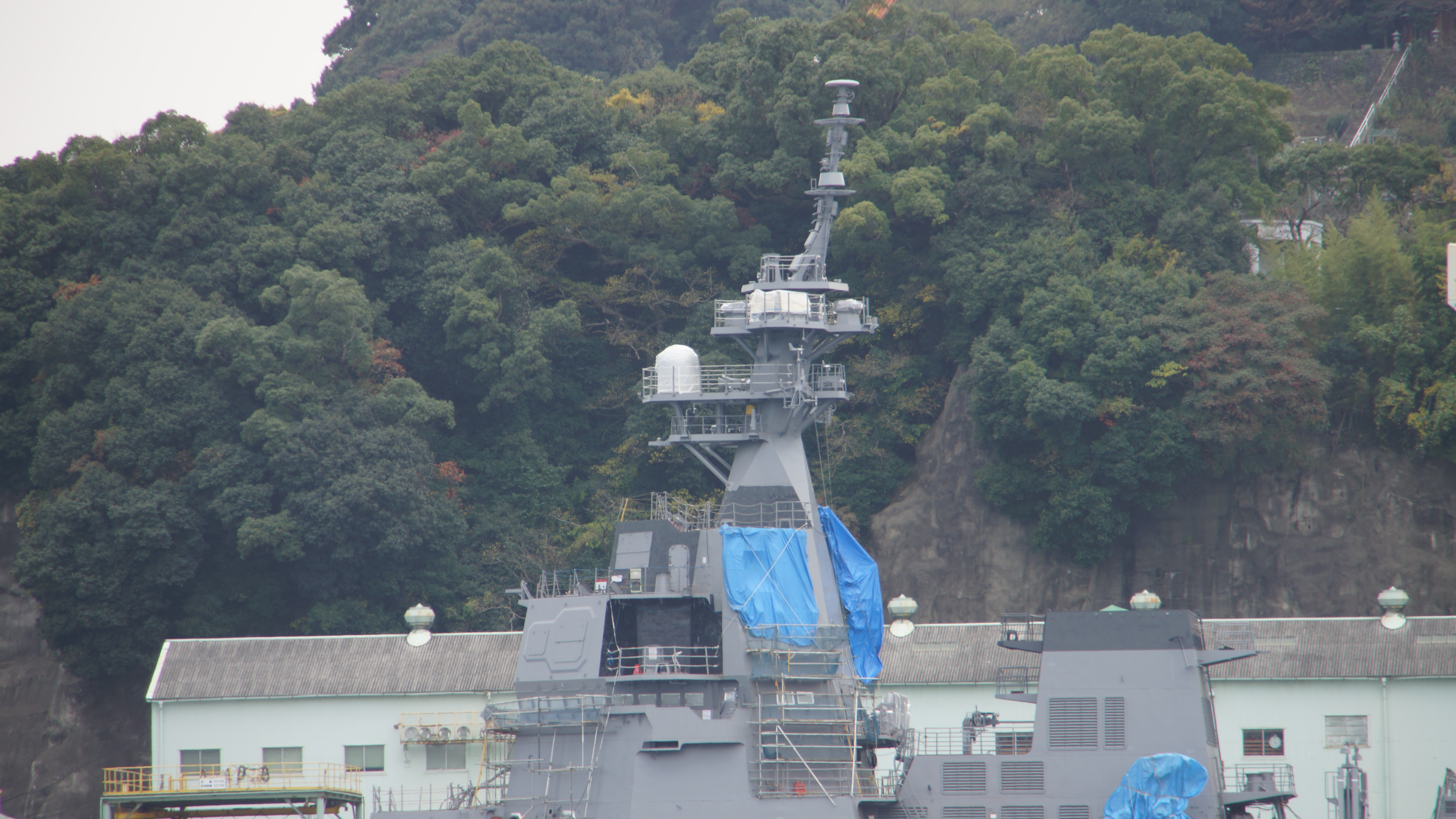 海上自衛隊 艤装中の護衛艦しらぬい（DD-120） マスト 左舷側面。2017年11月25日 三菱重工業長崎造船所にて。